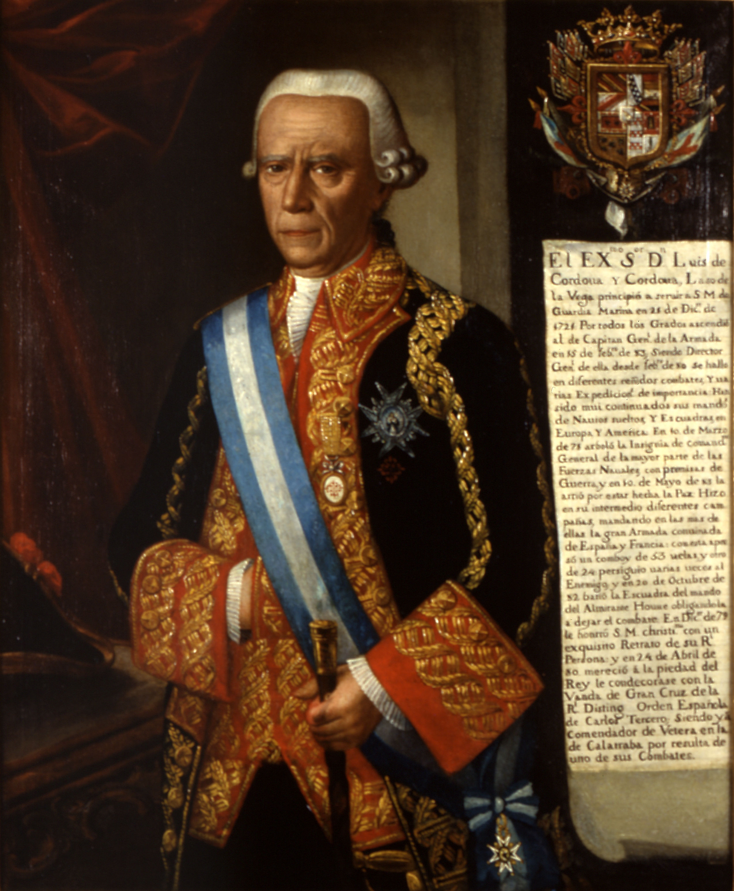 Retrato del marino español Luis de Córdova y Córdova (1706-1796), que fue capitán general de la Real Armada Española y caballero de la Orden de Calatrava. El retratado aparece en pie y vistiendo el uniforme grande de capitán general, que en aquella época era común para el Ejército y la Armada, y luce la cruz y la venera de la Orden de Calatrava, de la que era caballero, y la gran cruz y la banda de la Orden de Carlos III. Esta obra ya figuraba en el catálogo del Museo Naval de Madrid de 1853, y fue restaurada en 1993.